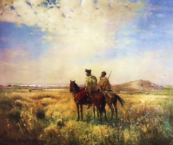 Ukrainian: Сторожа запорозьких вольностей Полотно, олія.title QS:P1476,uk:"Сторожа запорозьких вольностей Полотно, олія." label QS:Luk,"Сторожа запорозьких вольностей Полотно, олія."